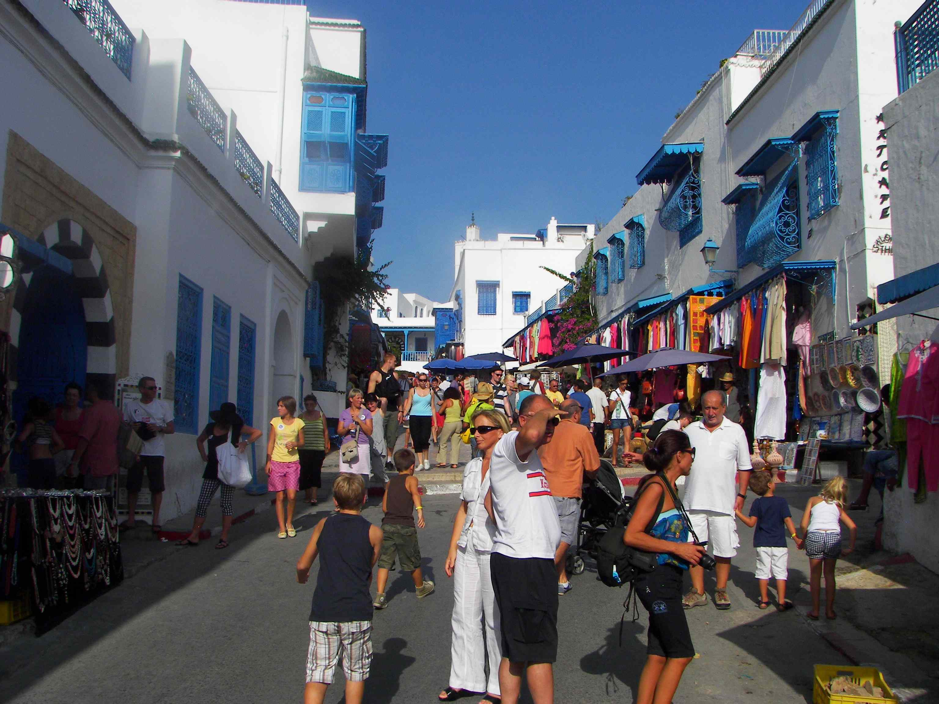 Hauptstraße von Sidi Bou Saïd